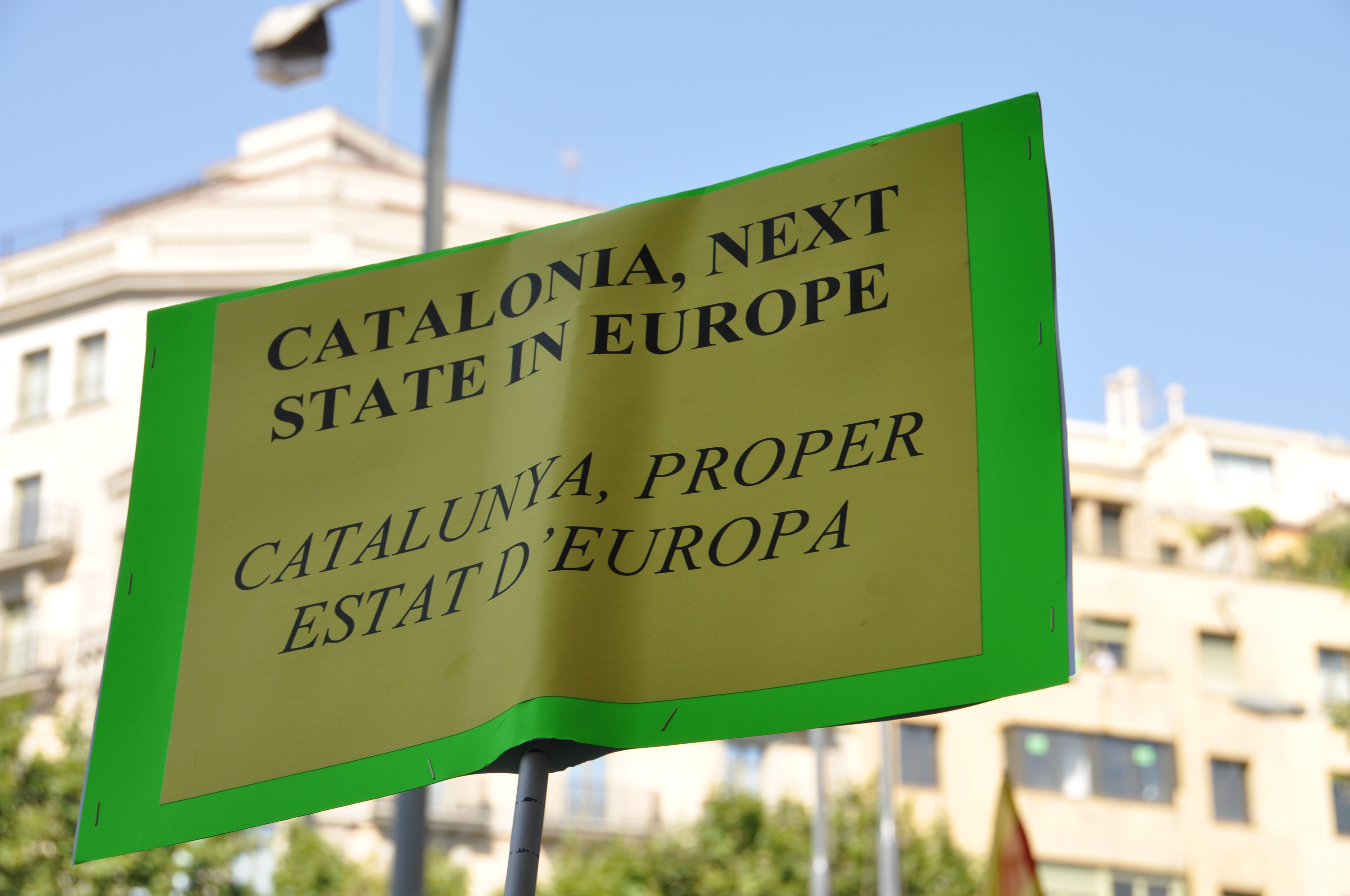 Pancarta a la manifestació del 10J